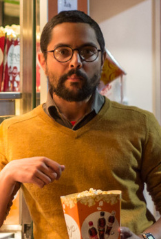 Festival EntreVues 2013 - Govinda Van Maele, réalisateur de "A day in the open"